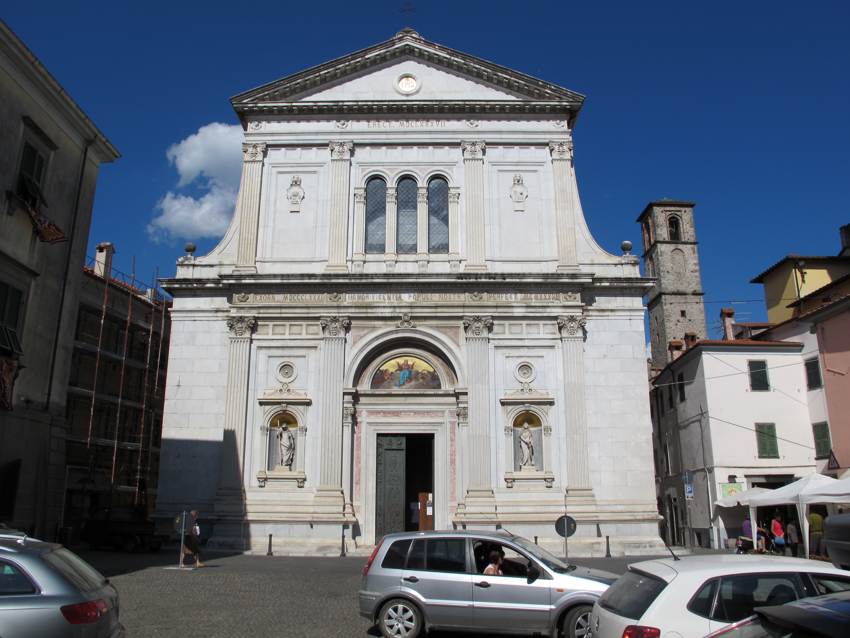 Duomo di pontremoli, facciata